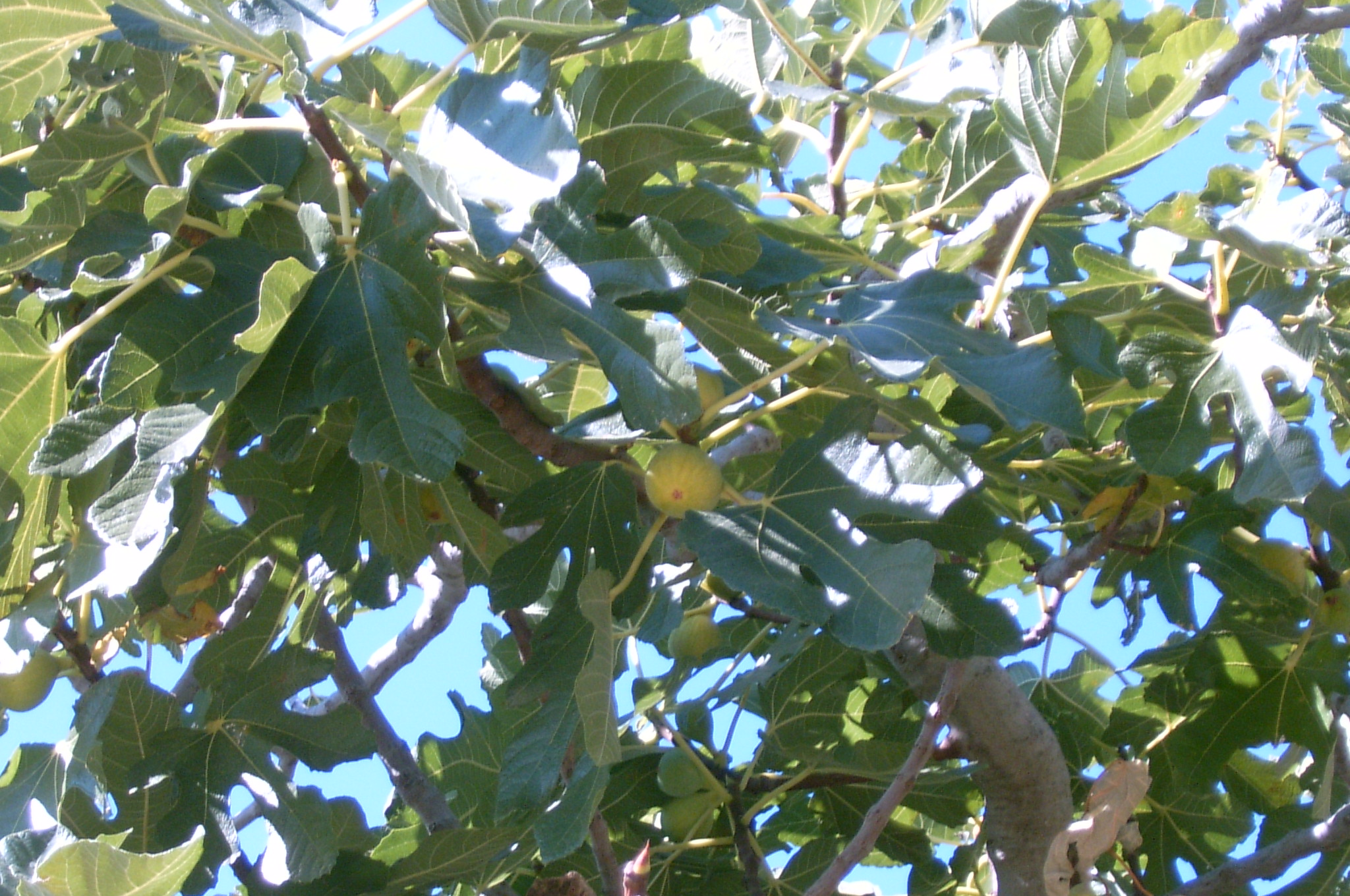 Chorwacja, Gornij Okrog na Ciovo.